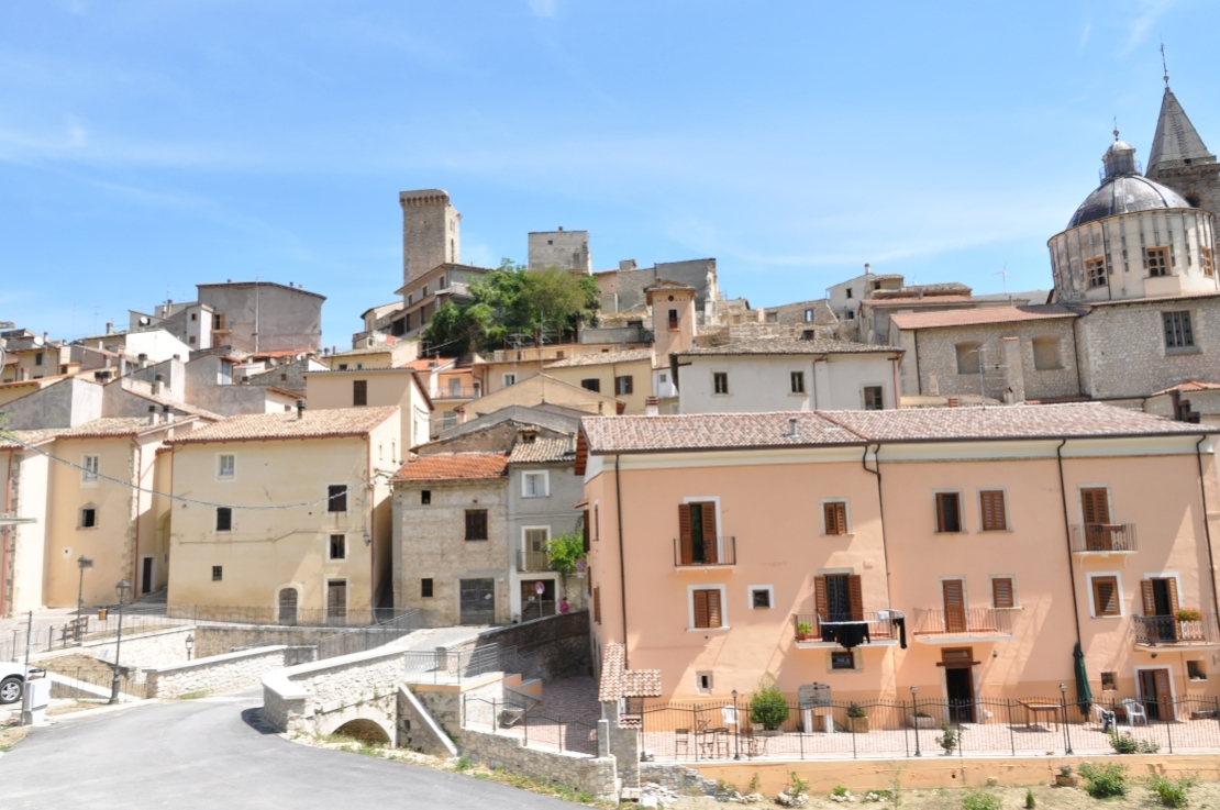 Cocullo 2012